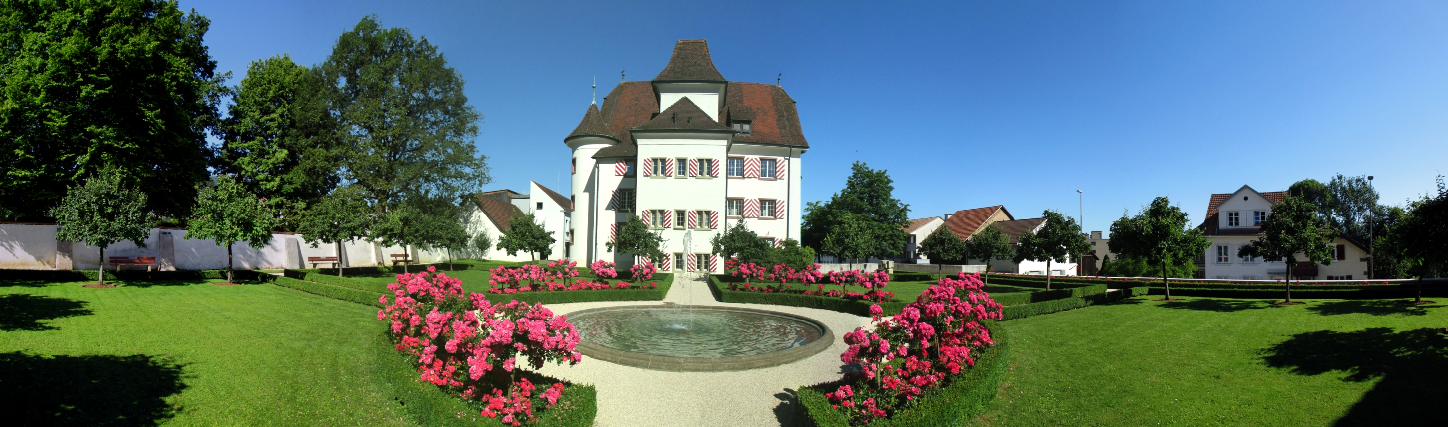 Schloss Aesch, Basel-Land, Schweiz